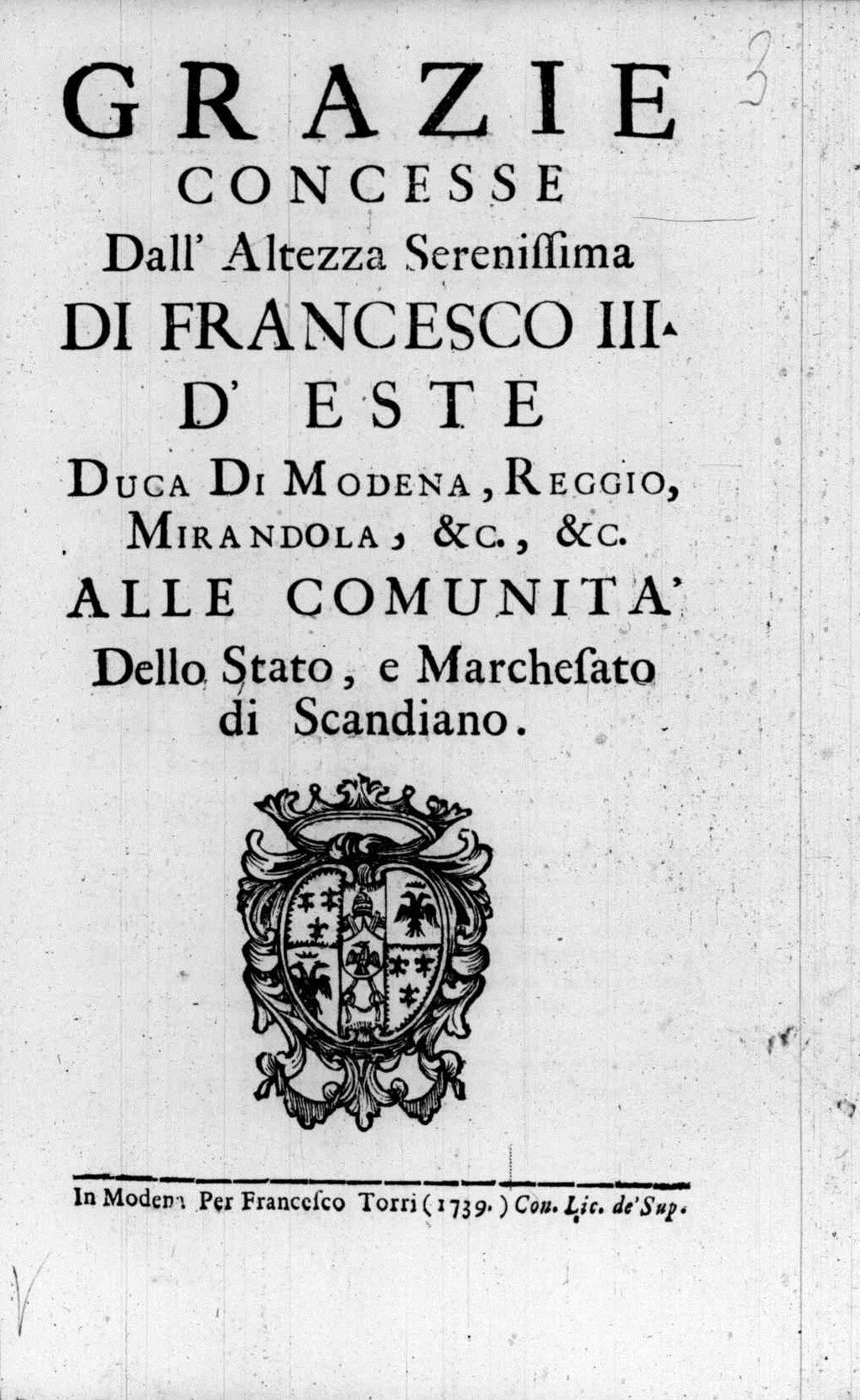 Frontespizio